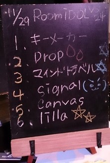 amiinaセトリボード(20151129(1))